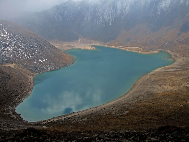 La laguna de la Luna en el Nevado de Toluca